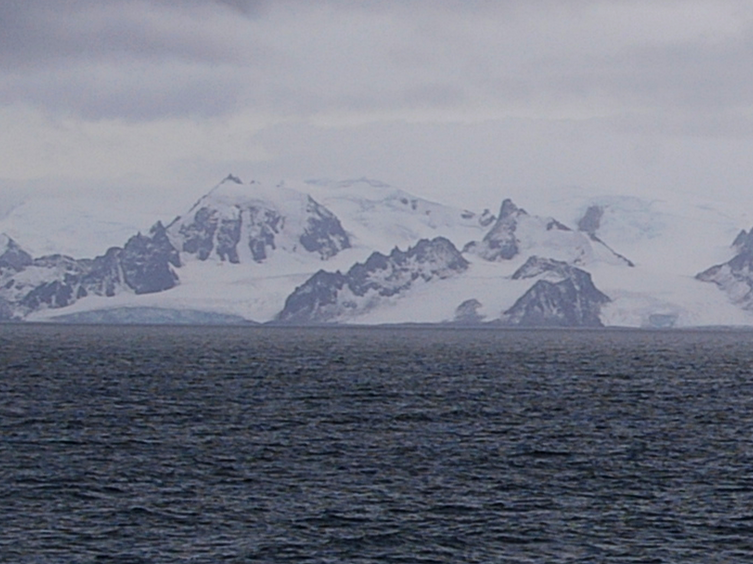 Ziezi Peak in Greenwich Island, Antarctica